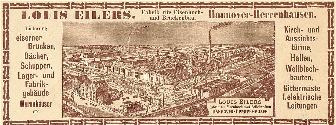 Briefkopf, vermutlich von einem Rechnungsbogen um 1900, mit einer Vogelschau über das weiträumige Gelände der Fabrik von „Louis Eilers. Fabrik für Eisenhoch- und Brückenbau, Hannover-Herrenhausen. / Lieferung eiserner Brücken, Dächer, Schuppen, Lager- und Fabrikgebäude, Warenhäuser etc. / Kirch- und Aussichtstürme, Hallen, Wellblechbauten, Gittermaste f. elektrische Leitungen“ Im Vordergrund links sind die großteils noch heute erhaltenen Verwaltungsgebäude an der Straße Entenfangwegzu sehen, davor und bis in die Bildmitte die verschiedenen Gleisanschlüsse für die Eisenbahn ...